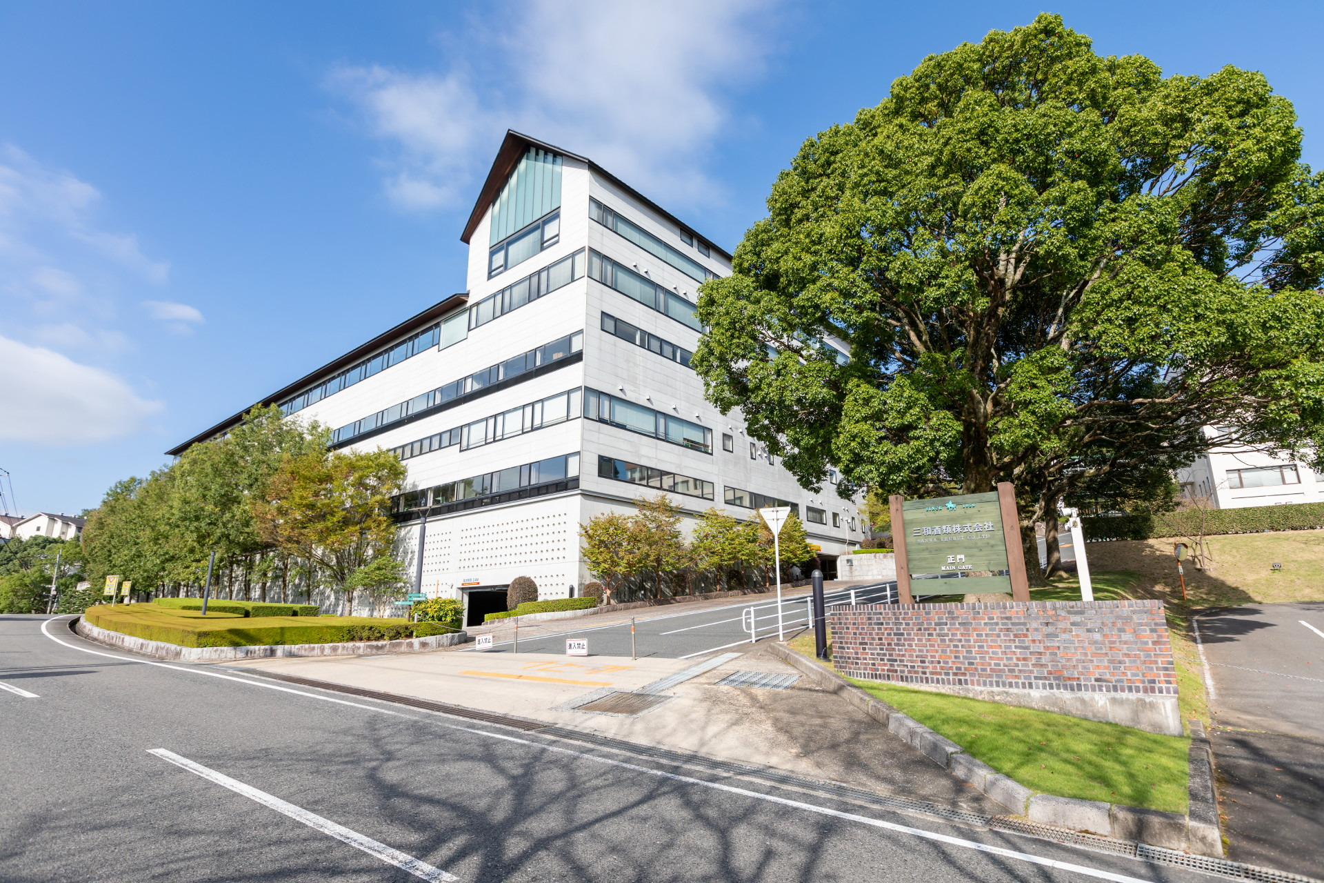 三和酒類株式会社の本社 正門前